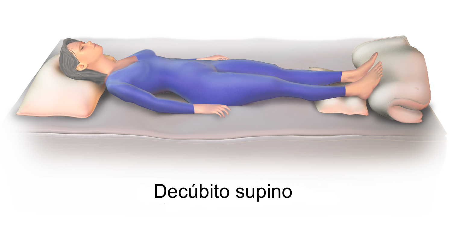 Representación de una persona en posición de decúbito supino o decúbito dorsal